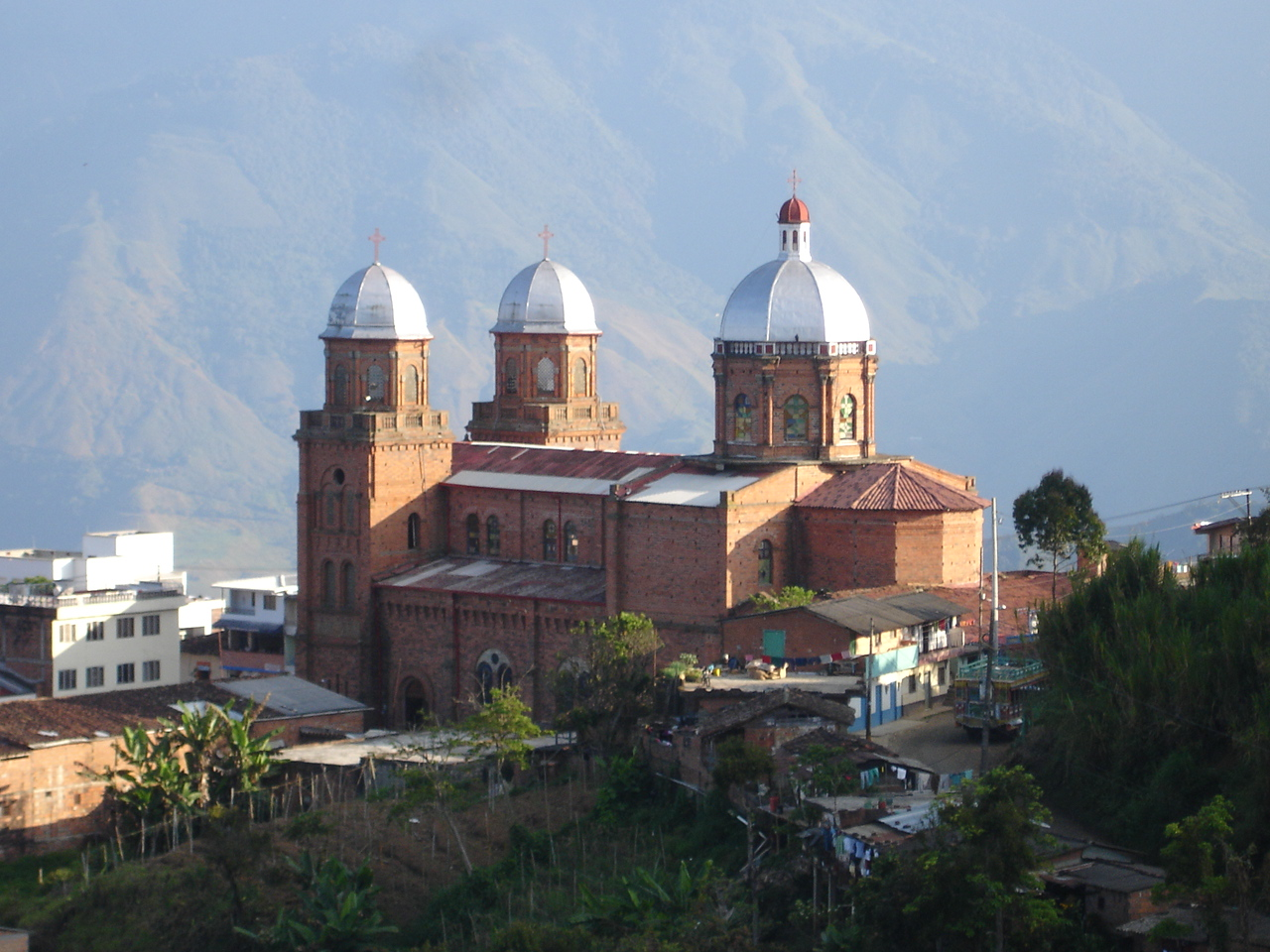 esta es la iglesia de altamira corregimiento de betulia, antioquia